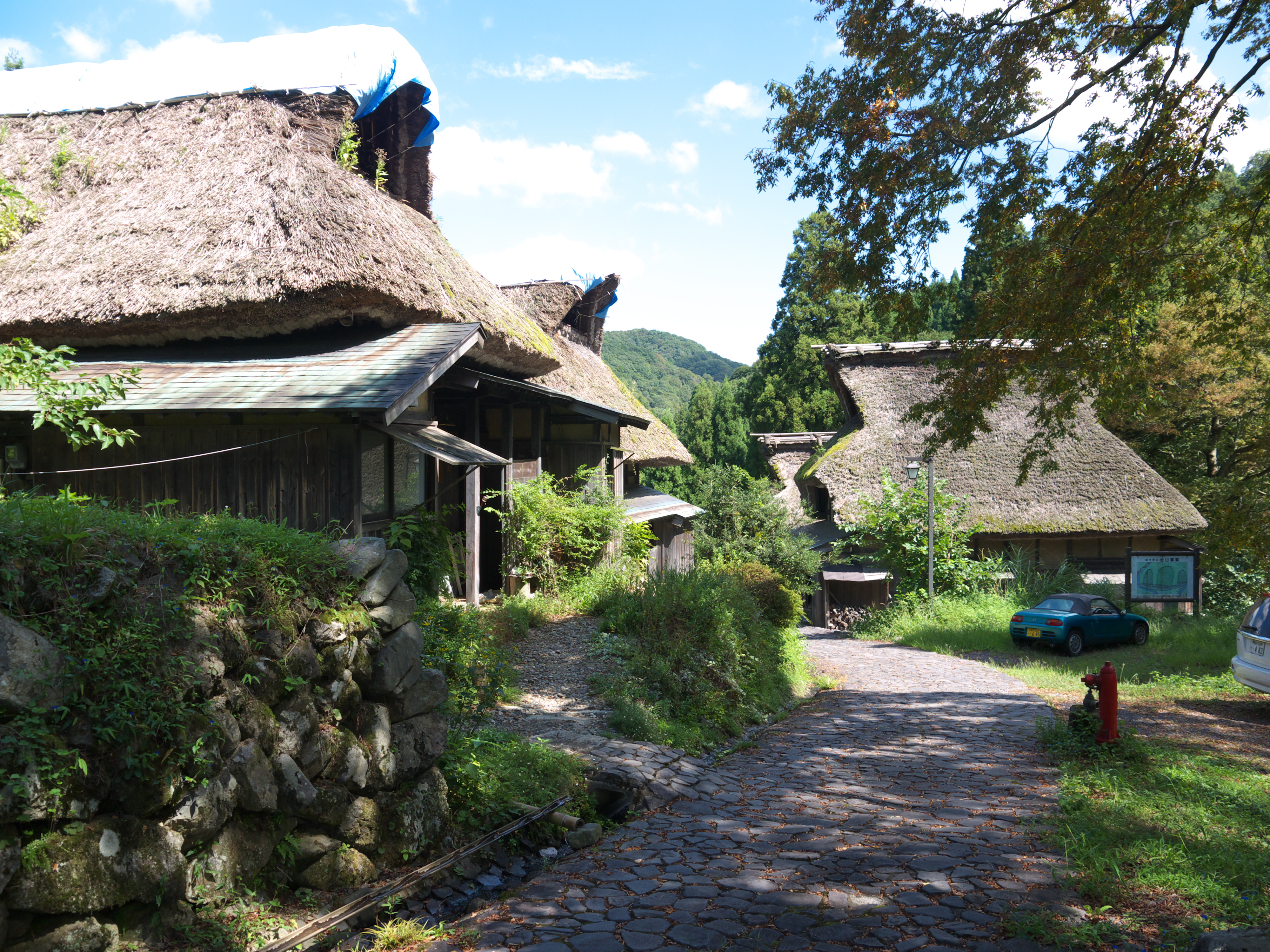 秘境百選・板取宿